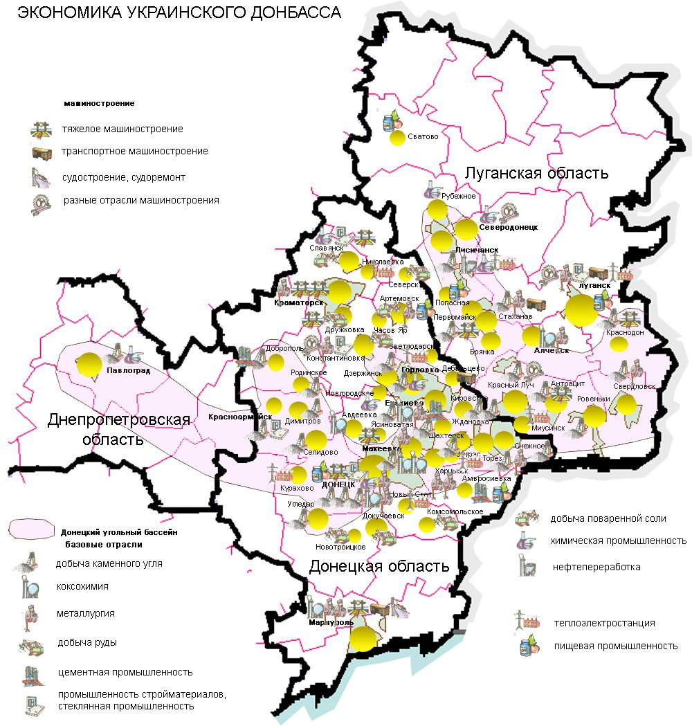 map